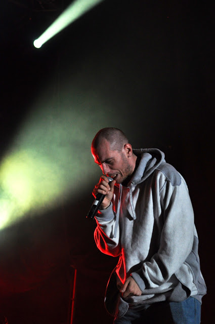 Polish rapper O.S.T.R.